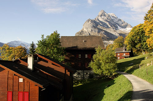 Spazierend mitten in Braunwald mit Blick zum Ortstock